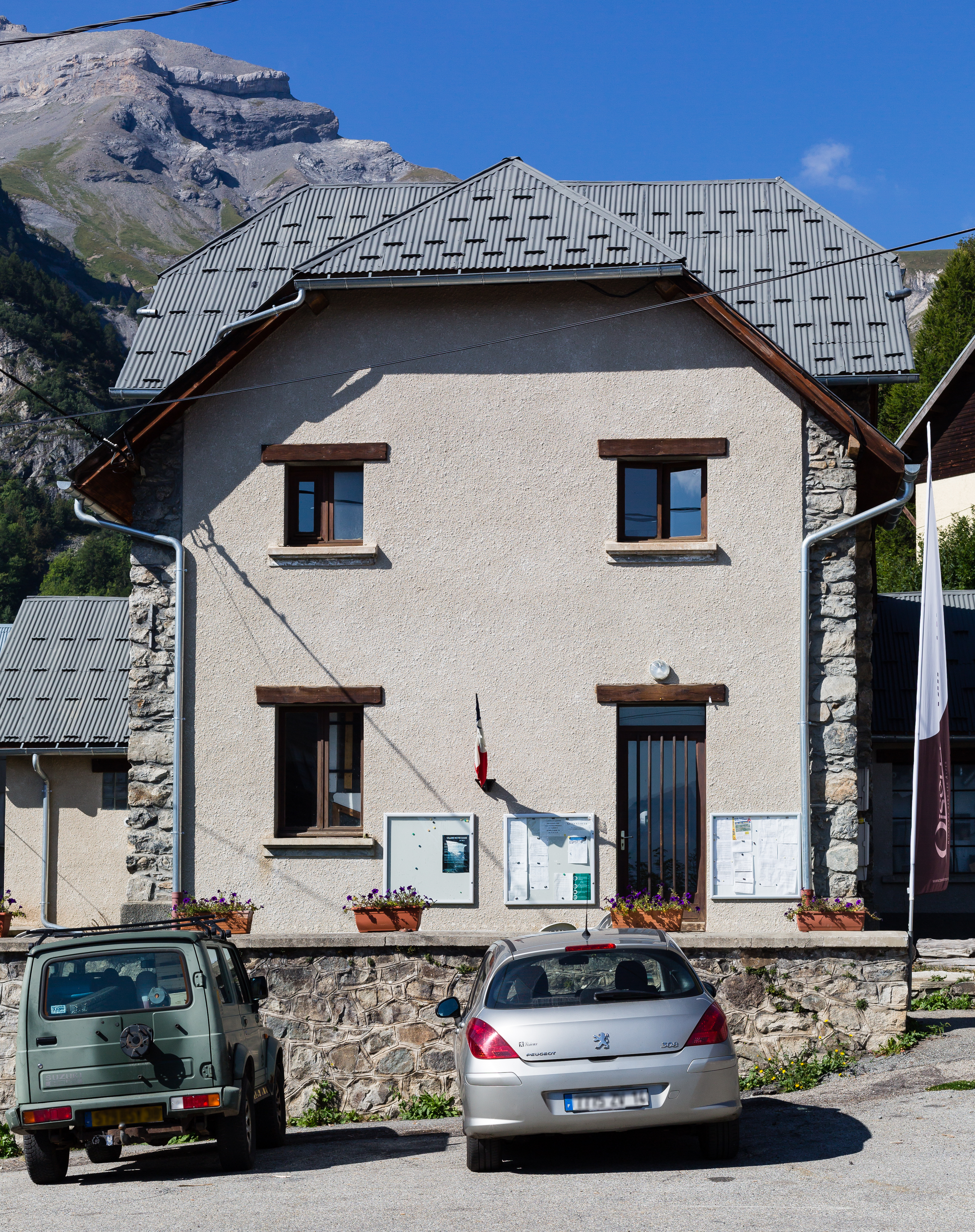 Mairie de Villard-Notre-Dame (France).